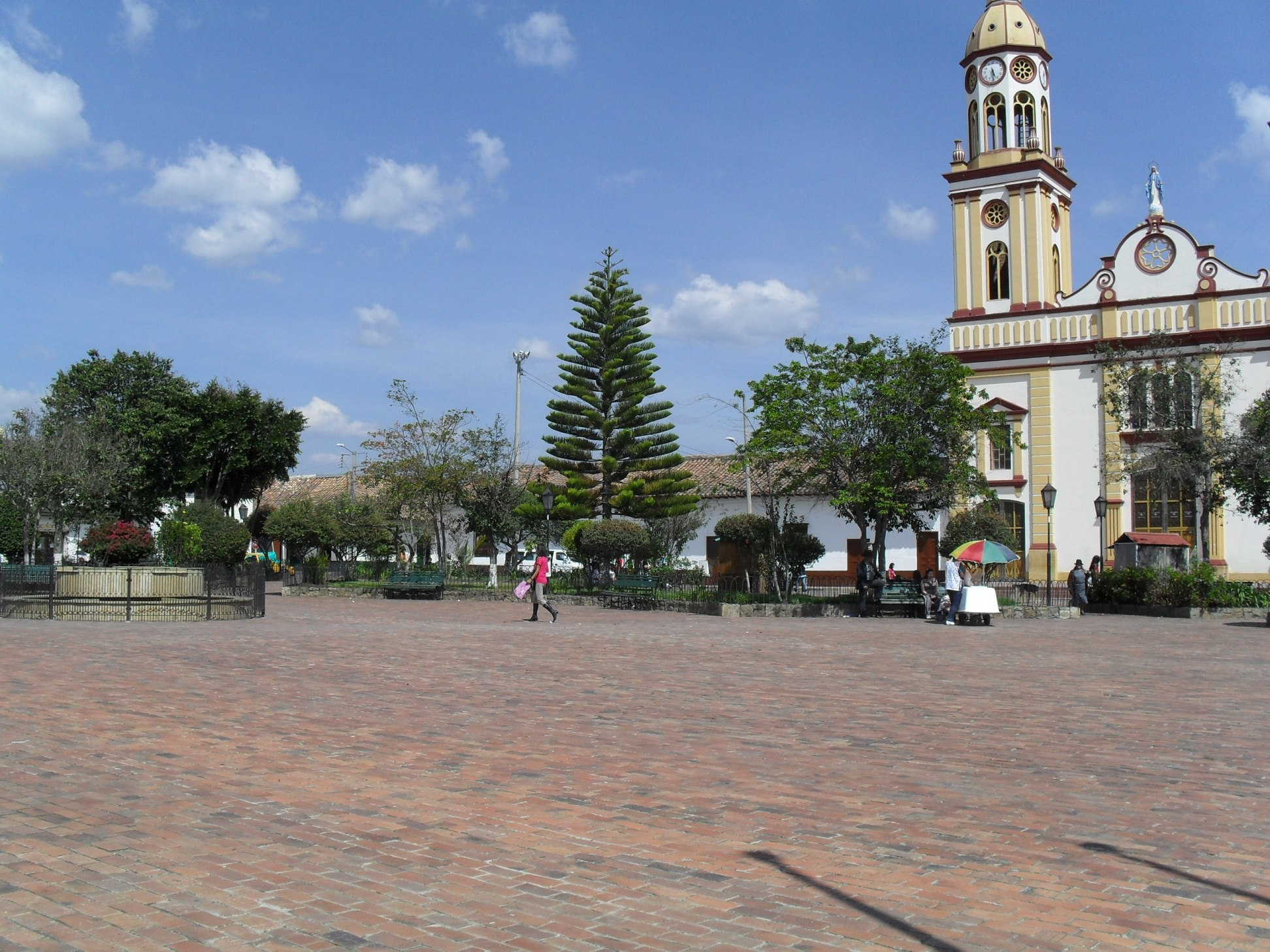 Parque principal del municipio de Simijaca, departamento de Cundinamarca, Colombia